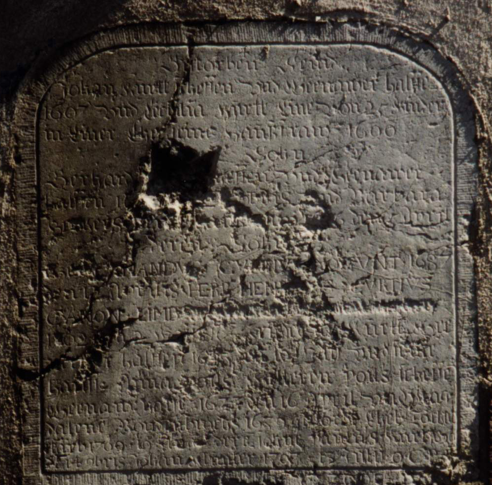 Gedenktafel des Pfarrers Otto Curtius für die Verstorbenen seiner Familie Die Blausteintafel befand sich ursprünglich in der Mauer hinter der Sakristei der alten Golzheimer Pfarrkirche. Heute befindet sie sich im südlichen Eingang zum als Kriegerdenkmal dienenden alten Turm dieser Kirche. Das Foto entstand um 1990. Die Inschrift lautet: Gestorben seind / Johan Kurtt Scheffen vnd Weenawer Halffe / 1607 vnd Cecilia Kurtt eine von 25 Kinder / in einer Ehe seine Haußfraw 1600 / deren Sohn / Gerhard Kurtt Scheffen vnd Weenawer / Halffen 1625 den 25. 9bris vnd Barbara / Beckers seine Haußfraw 1676 den 5. April / deren Söhne / Herr Amandus Curtius Mogunt. 1687 / den 12. Aprilis. Herr Henricus / Curtius Canon. Limb. / 1702 den 2. Maii. Friederich Kurtt Wee / nawer Halffen 1673 den 19. Maii vnd seine / Haußfraw Anna Poils Welteren Poils Scheffen / Weenawer Halffe 1673 den 16. April vnd Mag / dalena Bondenbrochs 1639 gestorben ehel. Tochter / starb 1709 19. Aug. deren Söhne Paulus Kurtt 1690 / den 14. 9bris. Johan Klunter 1707 13. Julii. O. C. P. P. [OTTO CVRTIVS PASTOR POSVIT] / 1720 den XI. 7bris.